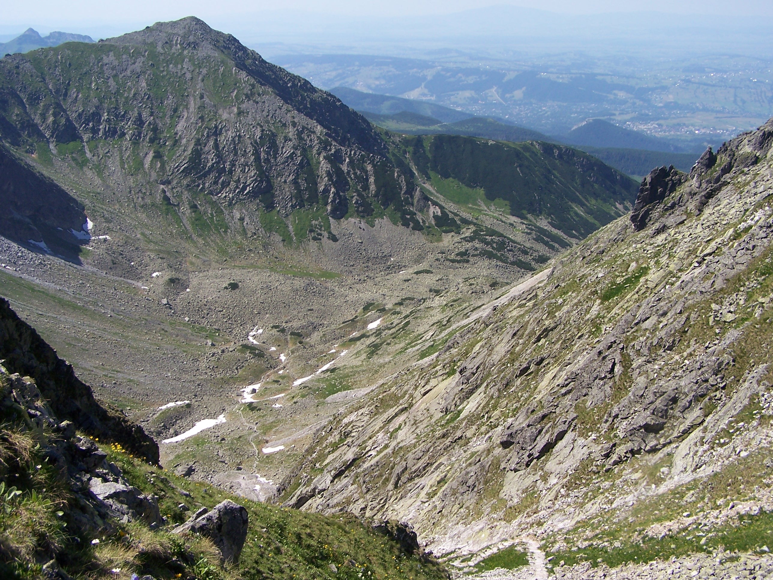 Dolina Pańszczyca, Tatry Wysokie